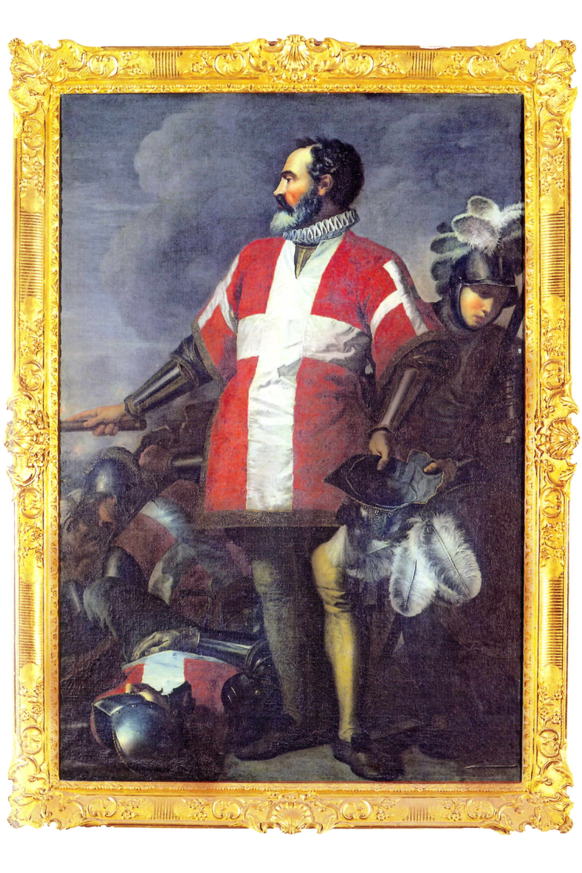 grand maître Jean de Valette par Antoine Favray - Palais des grands maîtres - La Vallette - Malte